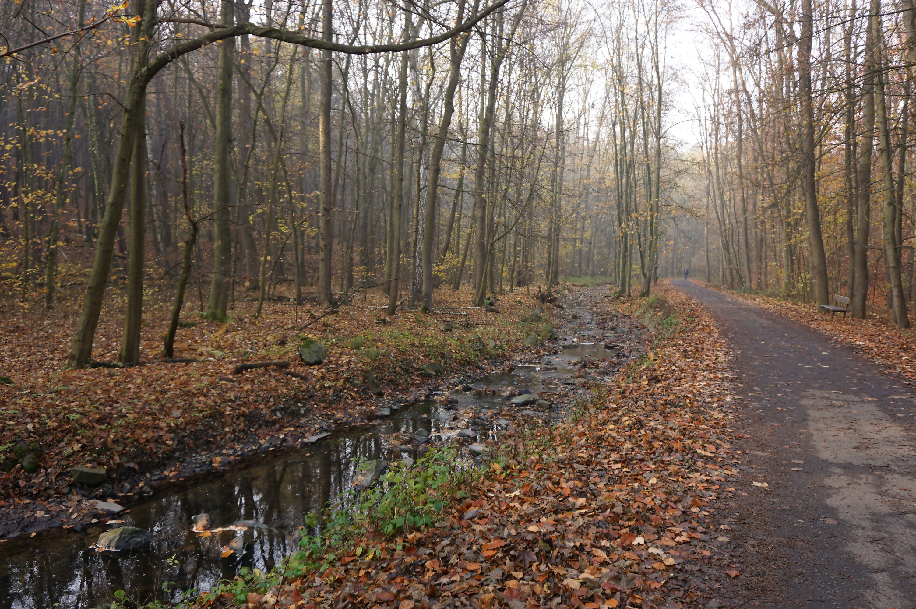 PP Modřanská rokle (podzim 2018)